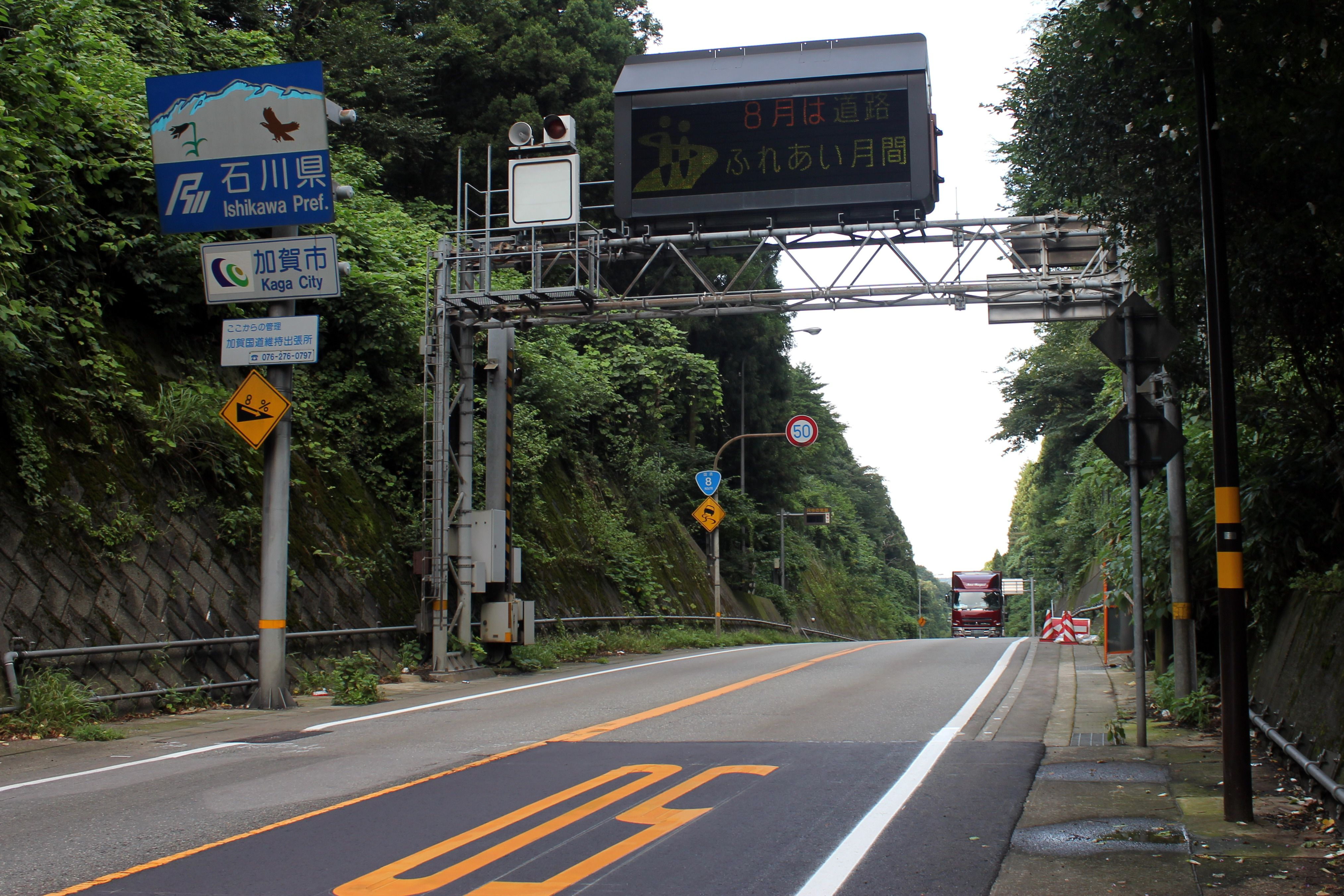 文言: 牛ノ谷峠（８号線、福井石川県境）